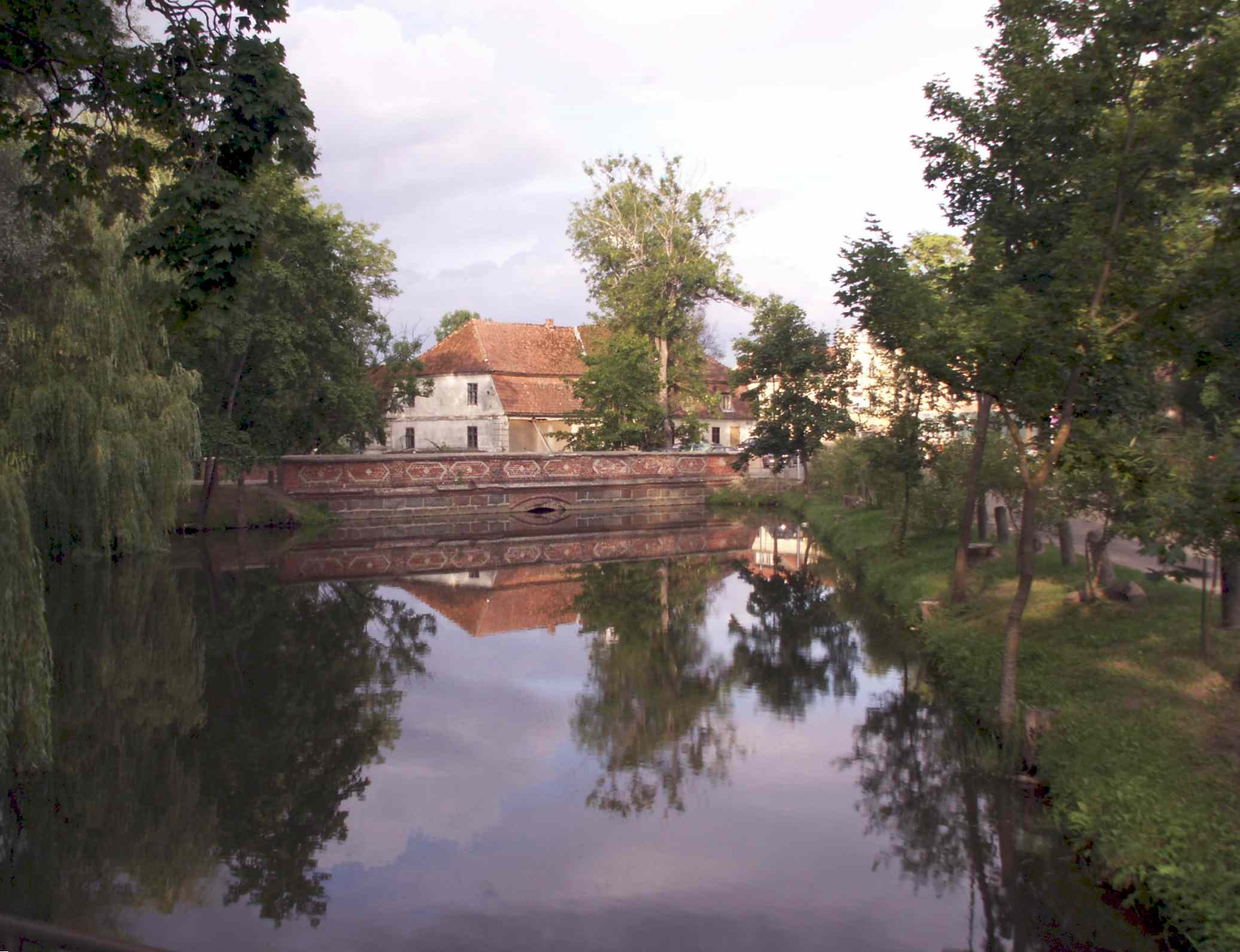 Alekšupės malūnasLatviešu: Alekšupīte Kuldīgas vecpilsētā